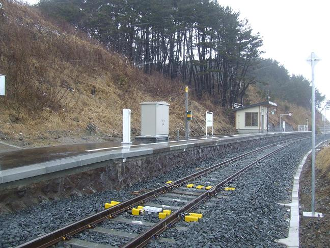 JR八戸線有家駅の震災後の復旧の状況